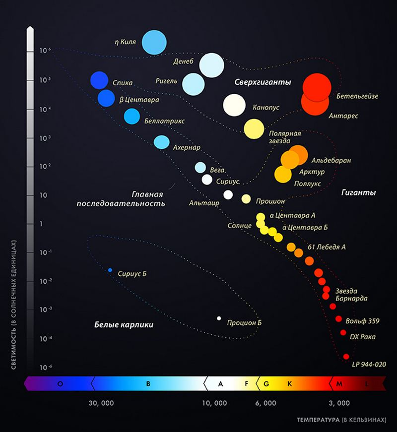 Диаграмма Герцшпрунга — Рассела (на русском)